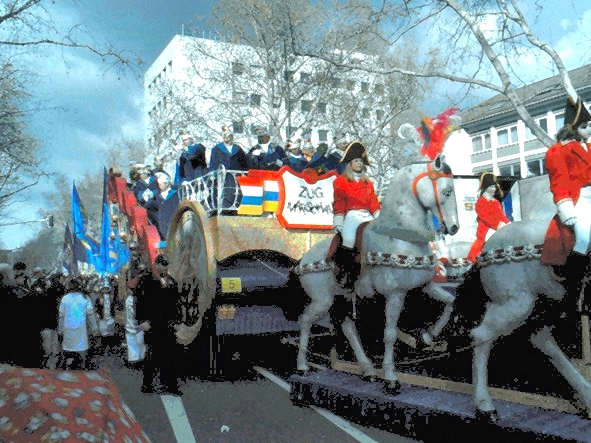 Beschreibung: Mainzer Rosenmontagsumzug, Marschall-Wagen Fotograf: presse03, selbst fotografiert Feb. 2004 Lizenz: GNU-FDL